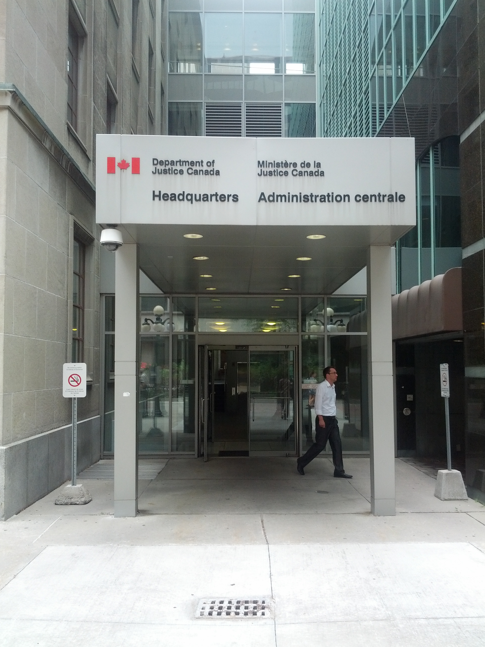 Ministério em Ottawa.